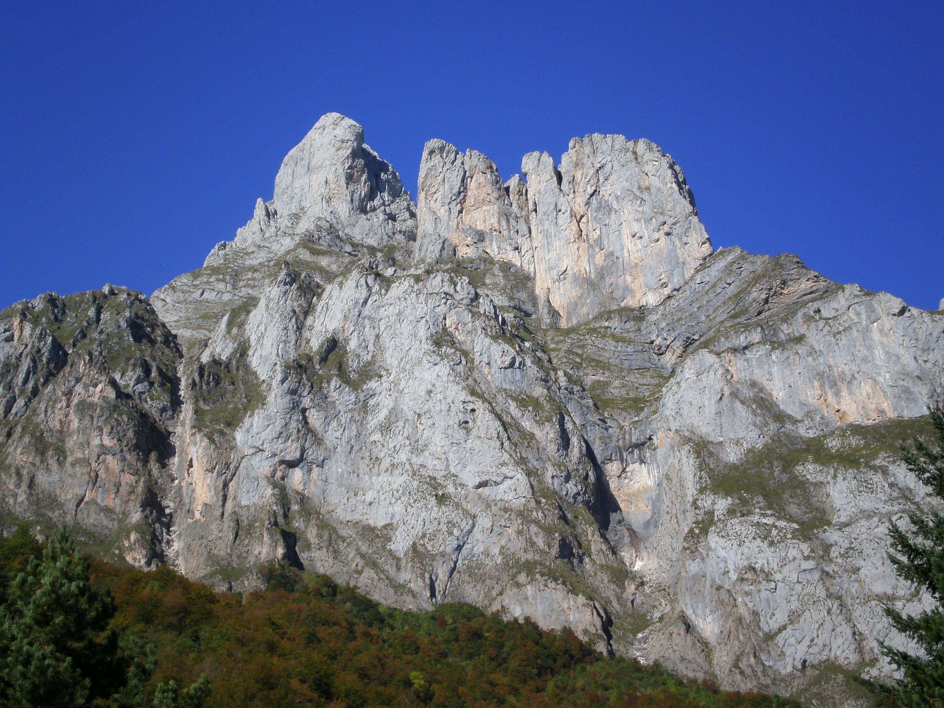 El torreón de Peña Remoña (2229 msnm) desde el interior del circo glaciar de Fuente De, Macizo Central de los Picos de Europa, Cantabria.